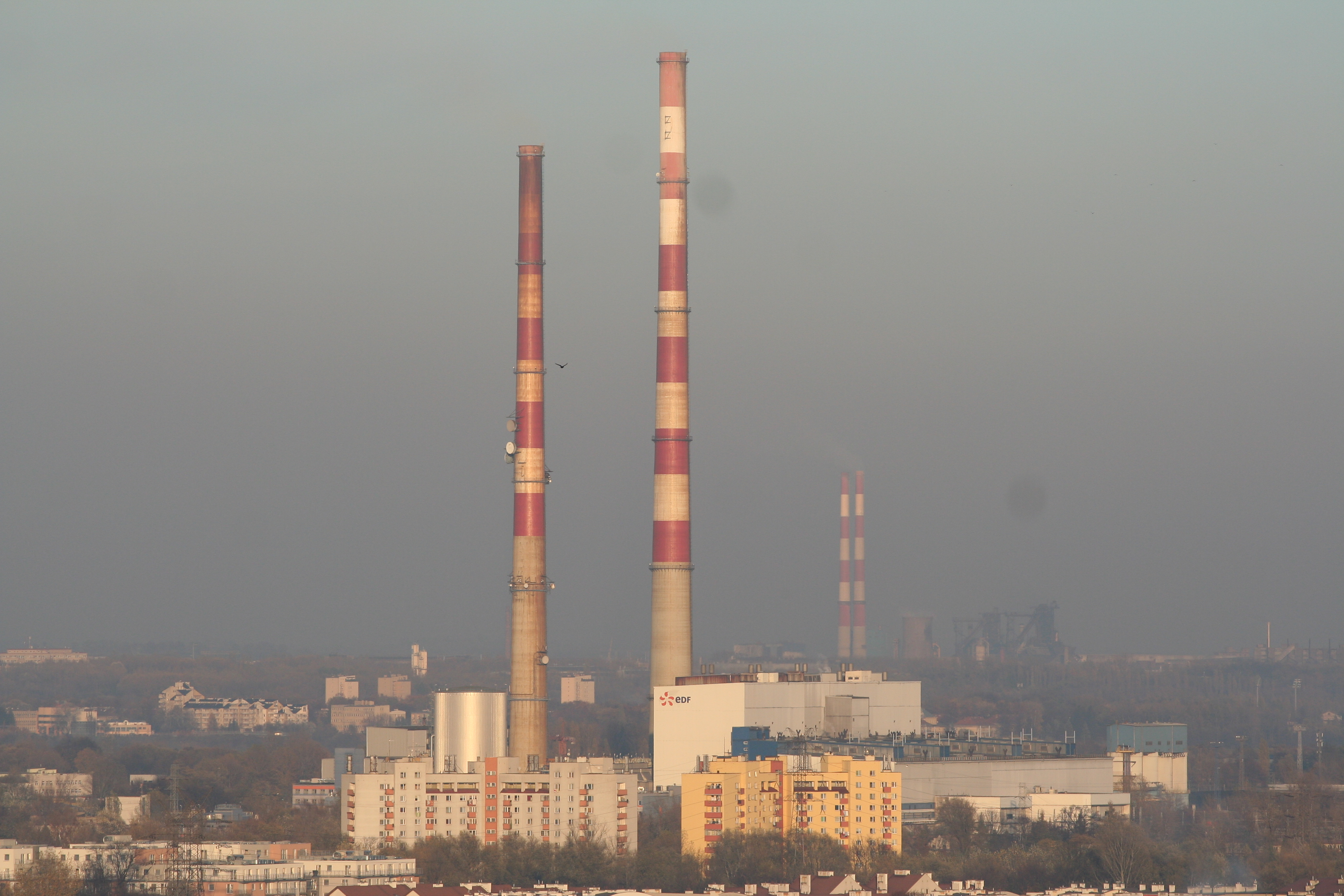 EDF Elektrociepłownia Kraków, widok z Kopca Kraka